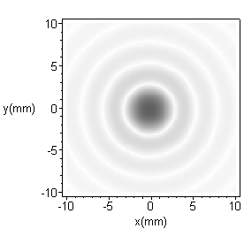 Figure de diffraction obtenue avec une ouverture circulaire. Domaine public